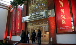 Exterior del Espacio cultural Nuestros Hijos